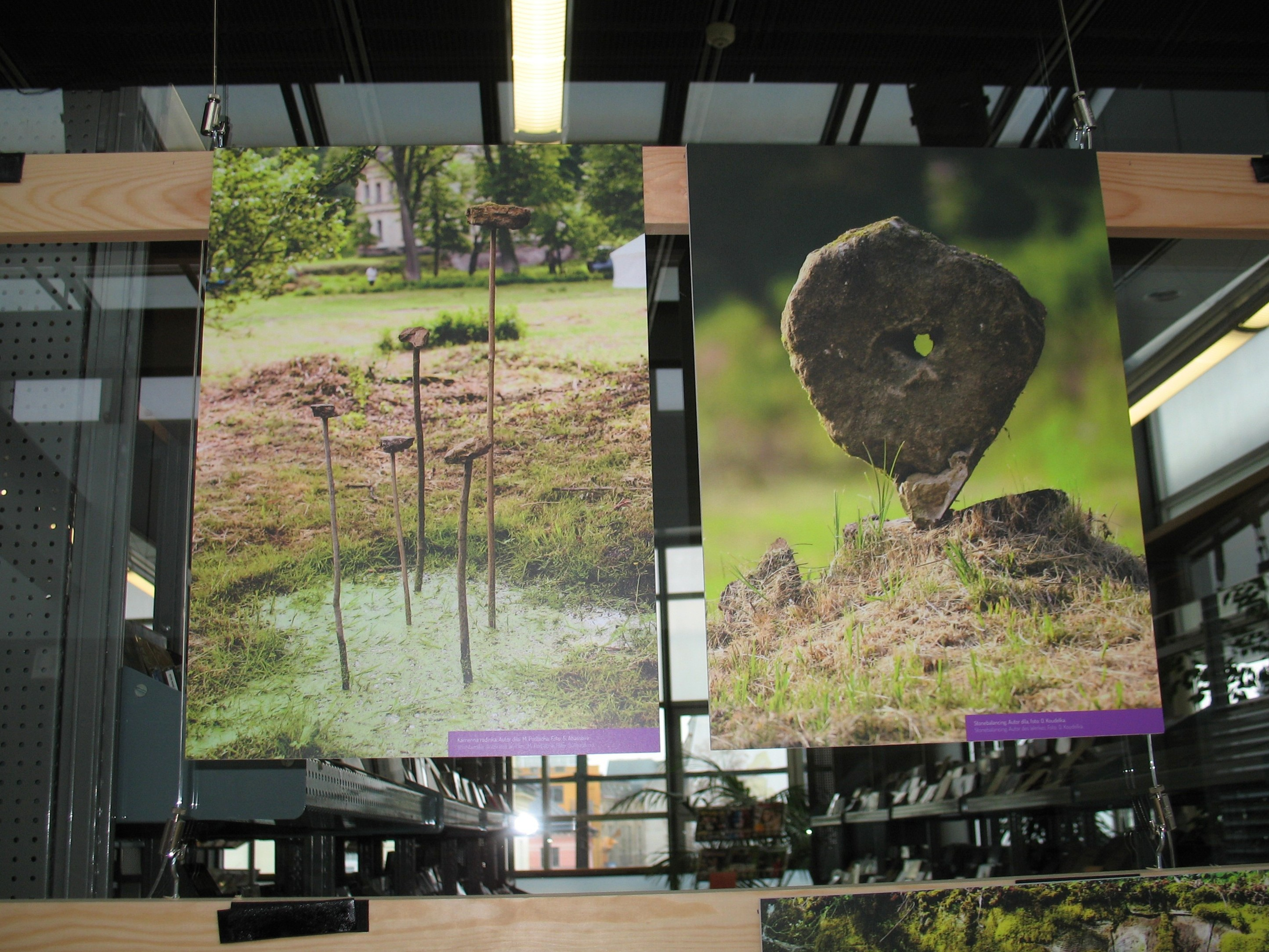 Výstavka v Krajské vědecké knihovně v Liberci, listopad 2016